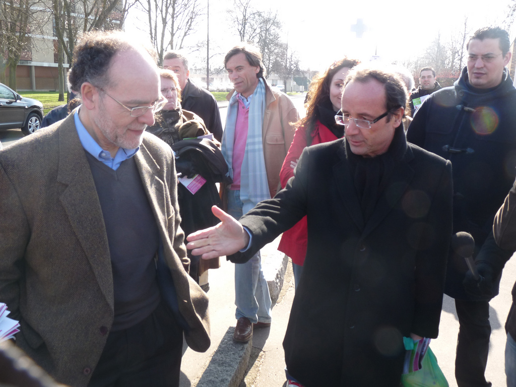 Gérard Sebaoun et François Hollande le 6 mars 2011 pendant la campagne des élections cantonales.